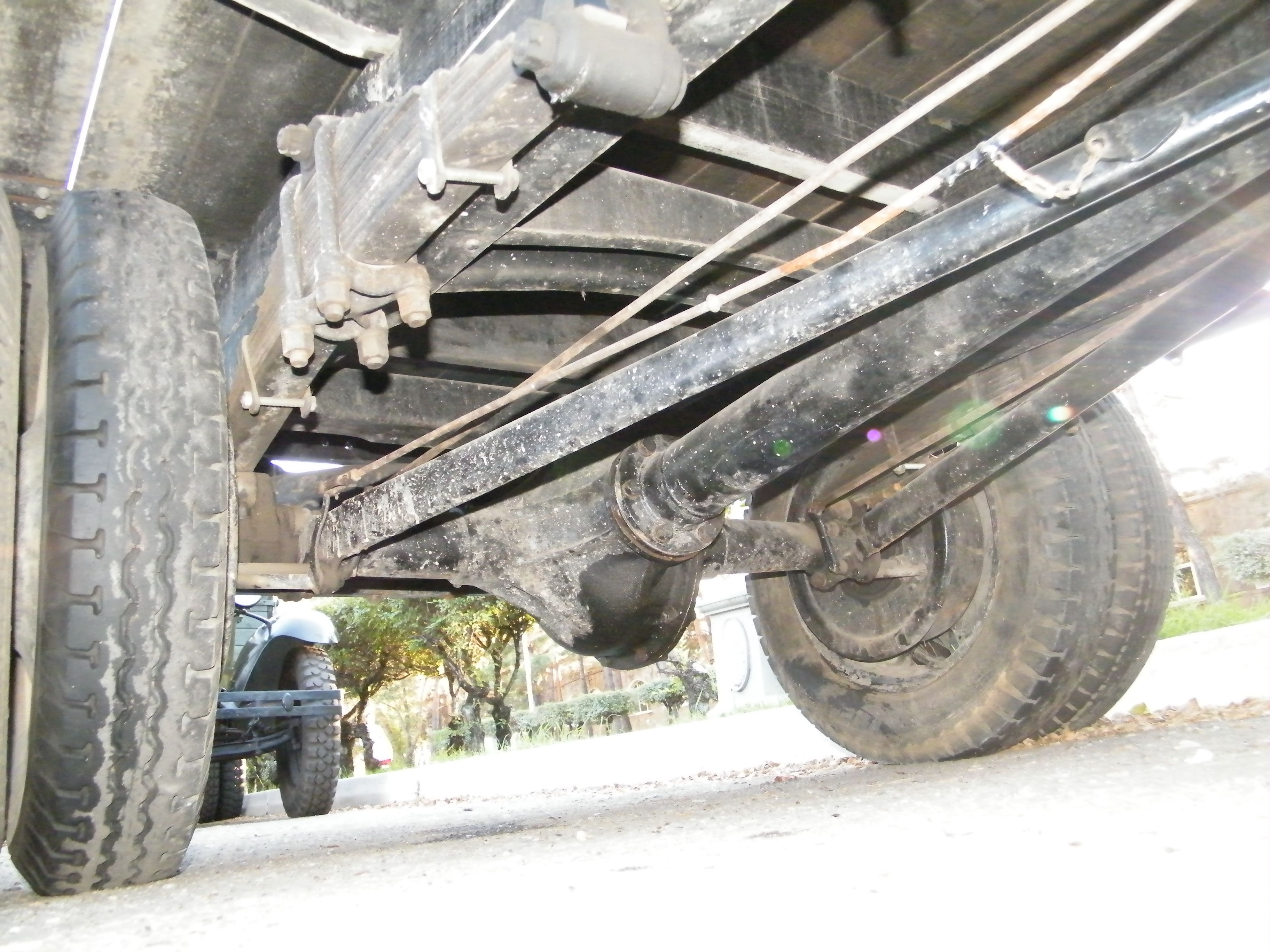 ГАЗ-АА, Хабаровск сентябрь 2014